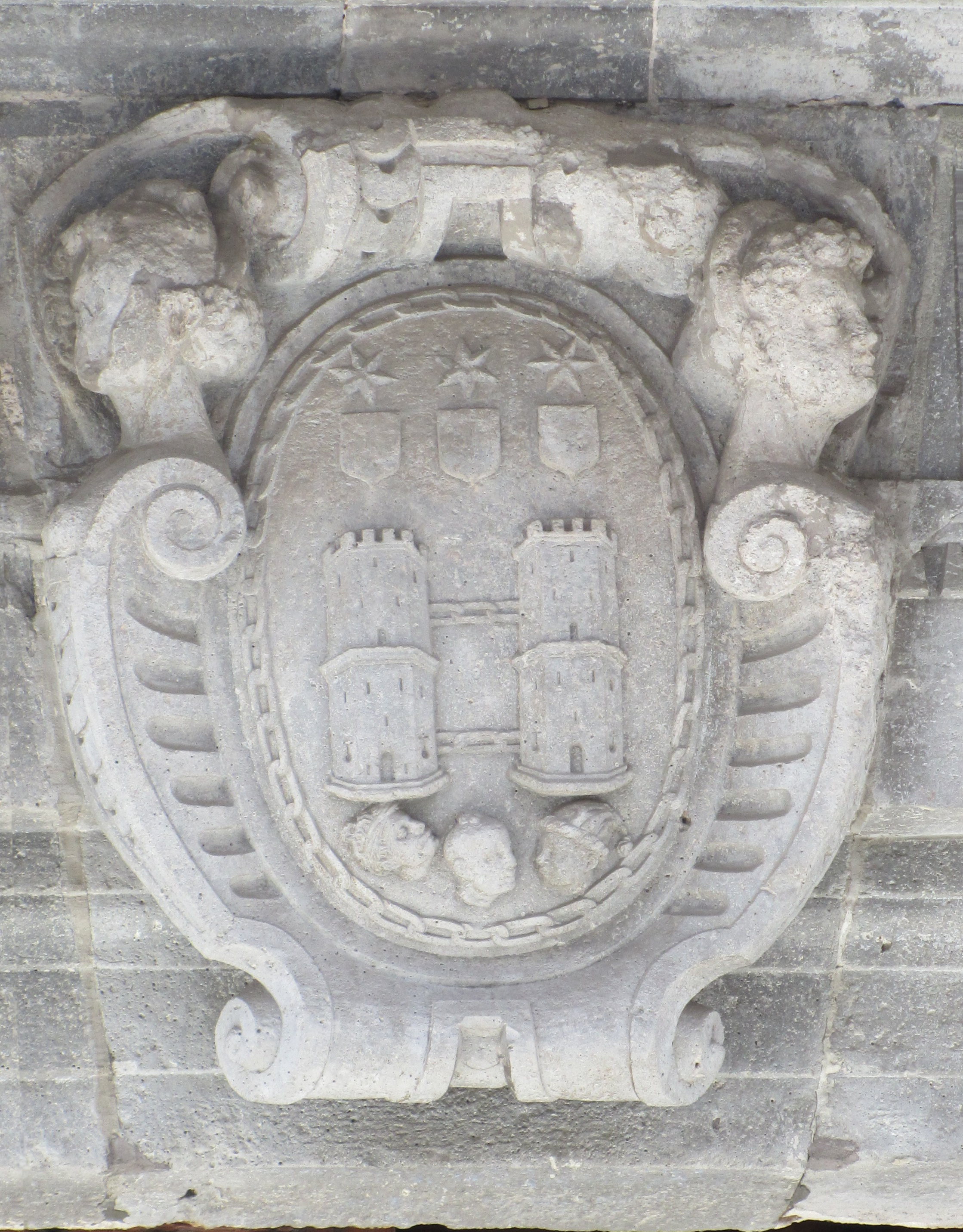 Escudo en piedra de los Treviño del siglo XVI, en el Palacio de Medrano de Ciudad Real (Castilla-La Mancha - España). Caracterizado por la presencia de tres cabezas de "moros". Situado en la calle Paloma, nº 9.